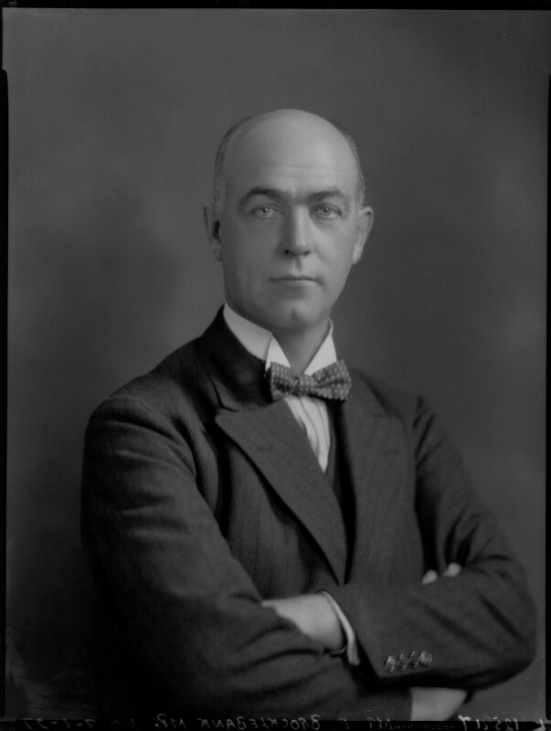 Edward Brocklebank